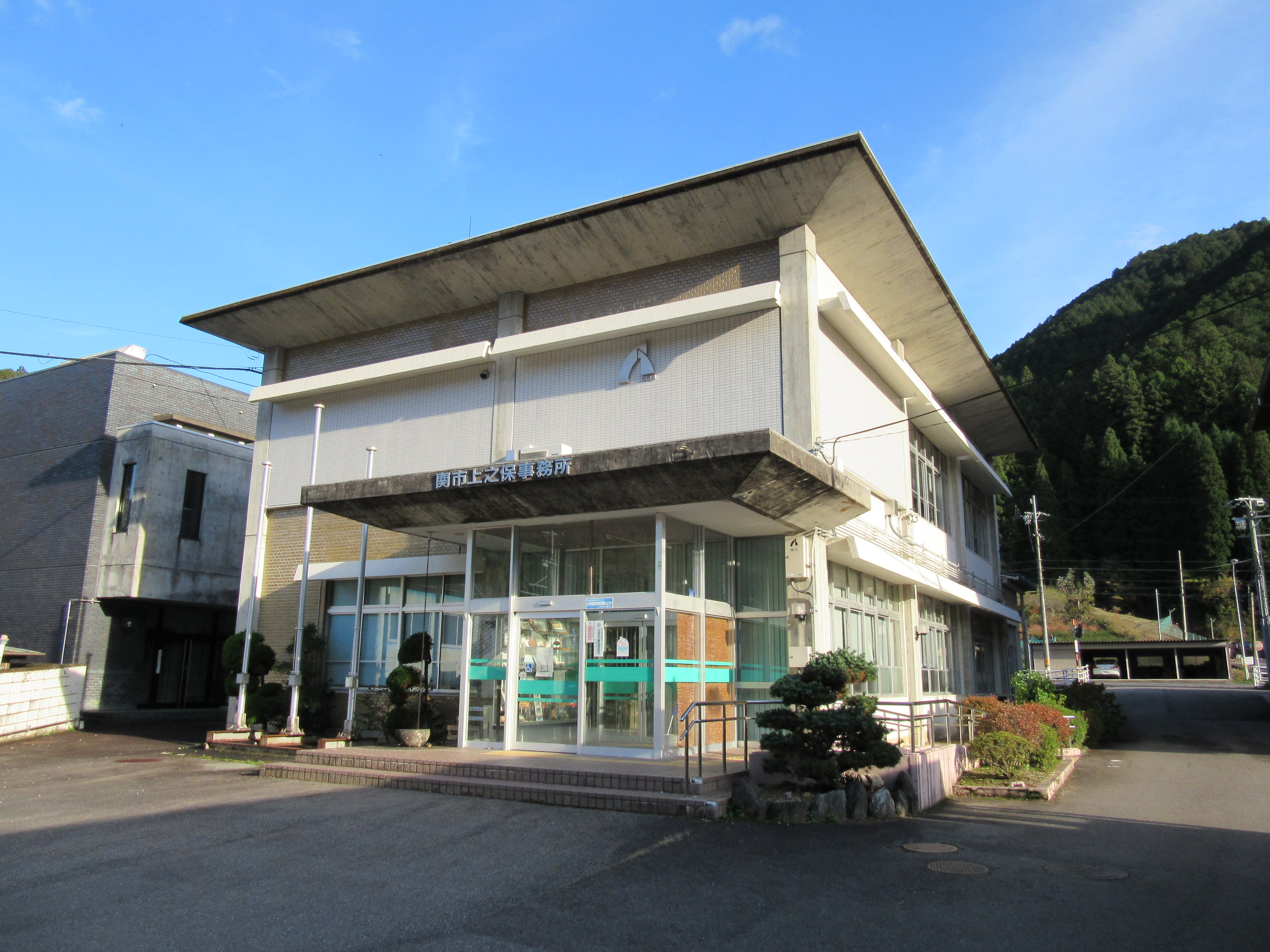 関市上之保支所